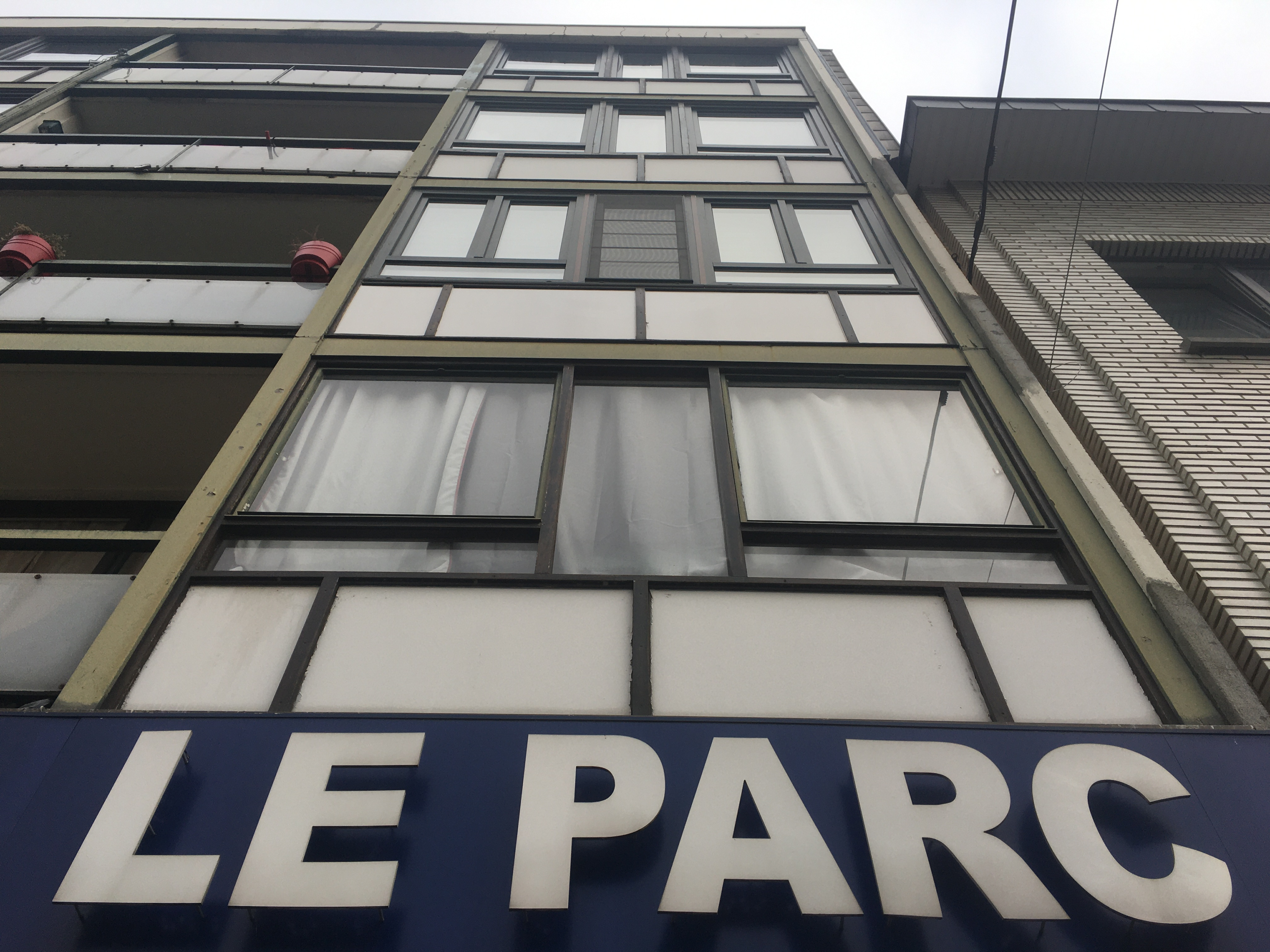 chassis bois glasal